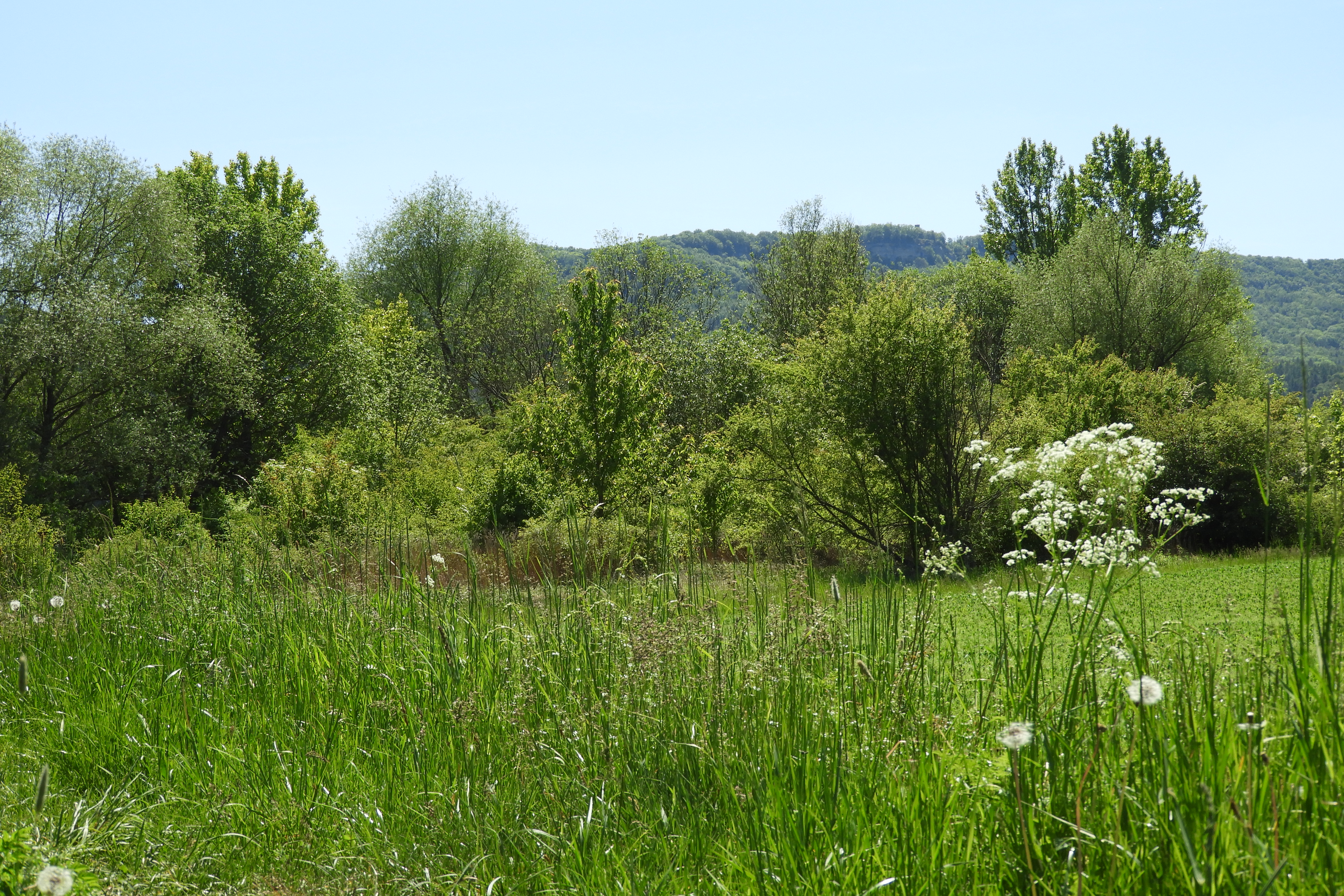 Die Werraaue Treffurt erstreckt sich in einer Sohle des Werratals im westthüringischen Wartburgkreis, unmittelbar an der Landesgrenze zu Hessen. In ihr befinden sich mit Wasser gefüllte ehemalige Kiesgruben mit ausgedehnten Röhrichten und Großseggenrieden, die zum Lebensraum für Vögel und Amphibien geworden sind. Die Biotope und Arten, die der Auenbereich beherbergt, gelten wegen ihrer Besonderheit als schutzwürdig. Um sie zu erhalten und Störungen von ihnen fernzuhalten wurde die Fläche im Juni 1996 zum Naturschutzgebiet erklärt. Als eine der „Perlen“ des „Grünen Bandes“ wird die Treffurter Aue als ein wichtiger Trittstein in dem Biotopverbund entlang der Werra angesehen. Der geschützte Auenbereich setzt sich auf hessischer Seite mit dem Naturschutzgebiet „Frankenloch bei Heldra“ fort.